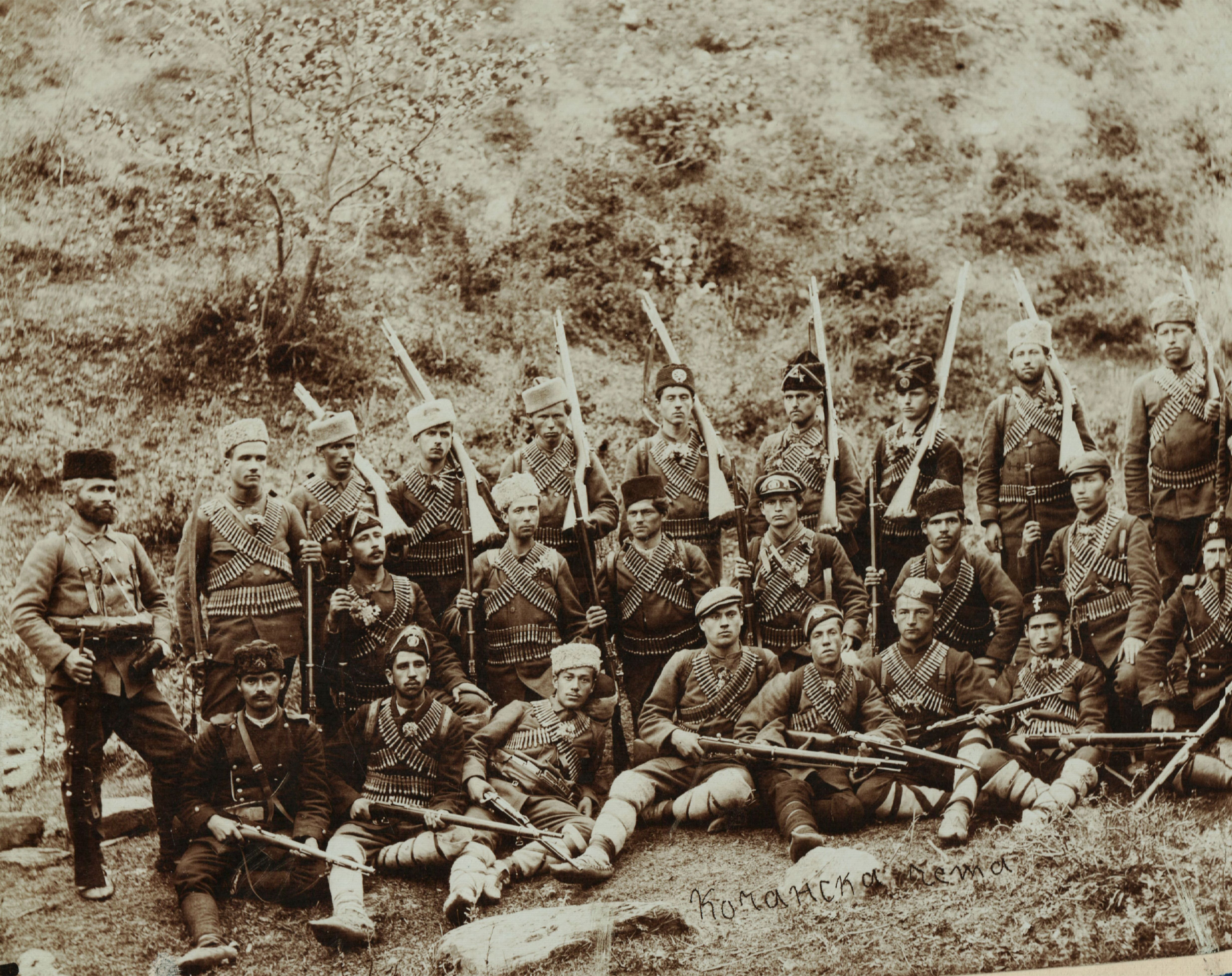 Снимка на Кочанска чета